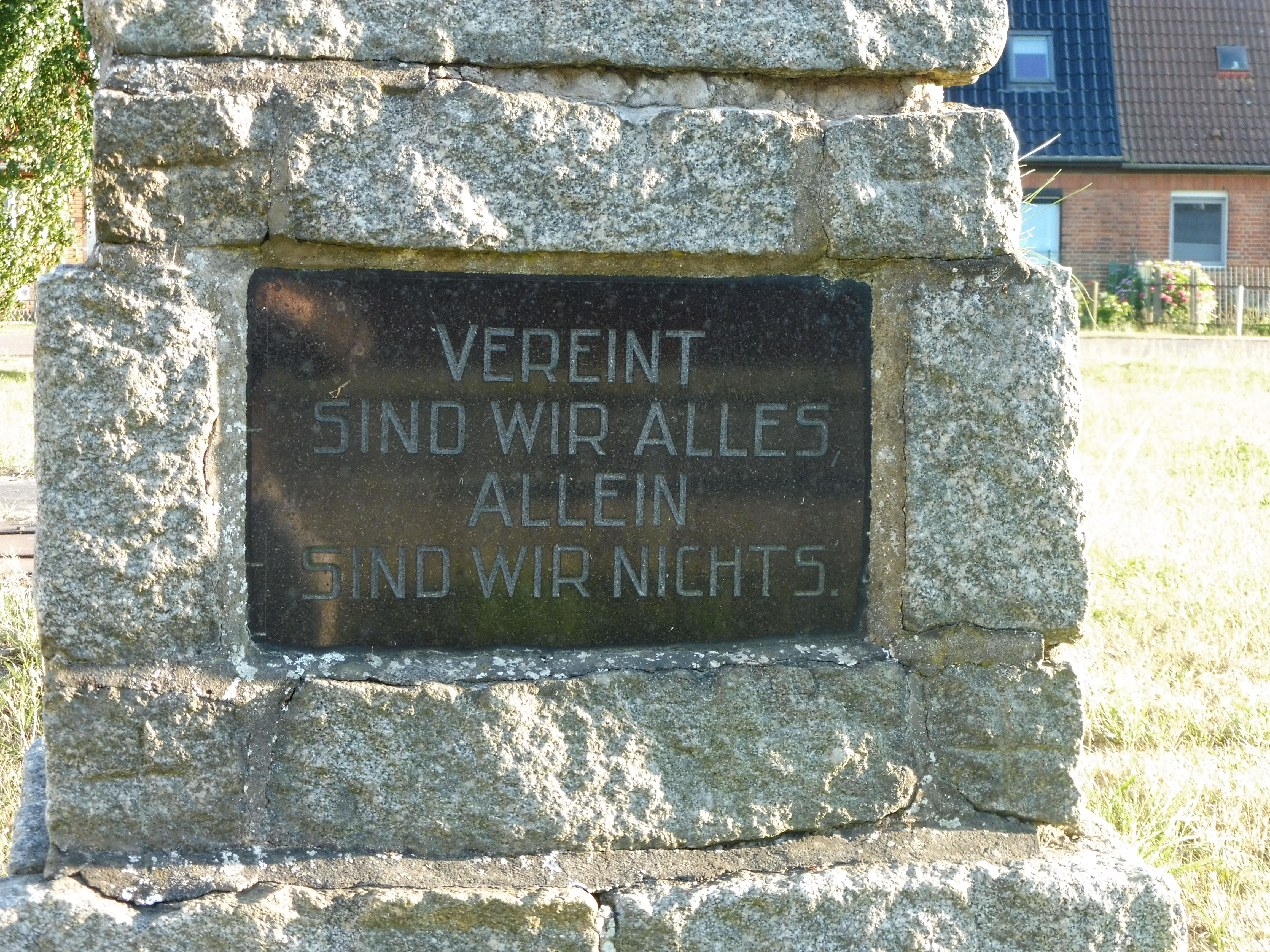 Gedenkstein zur Kollektivierung an der Bundesstraße 191 in Klebe (Plau am See)